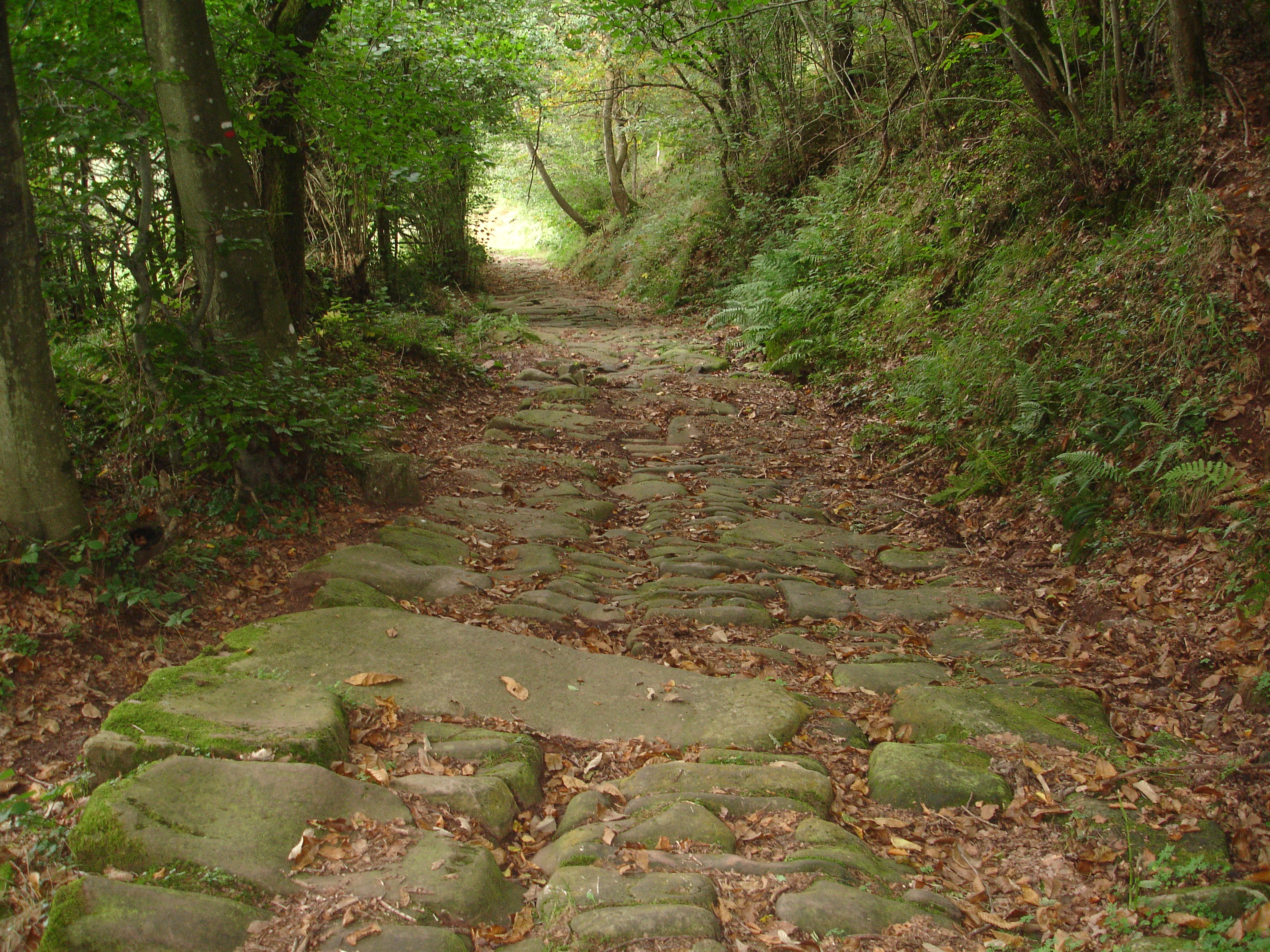 Calzada romana del valle del Besaya a su paso por Pesquera (Cantabria).